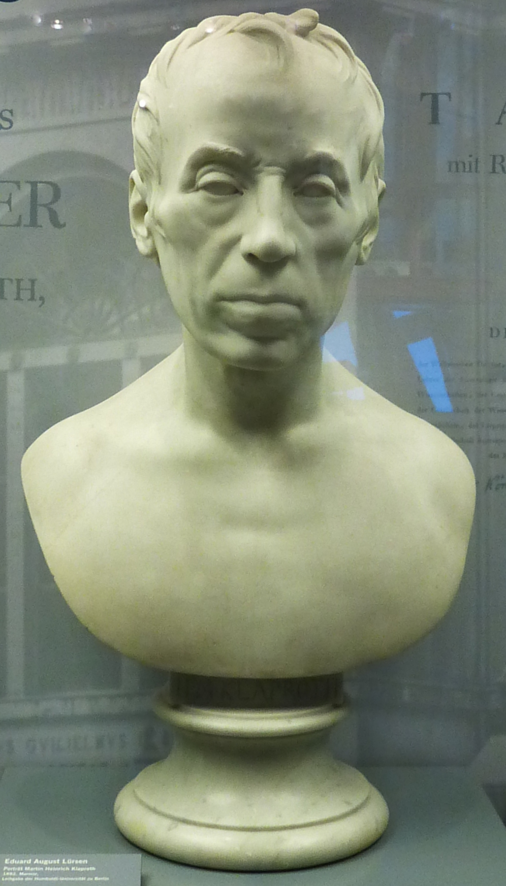 Eduard August Lürsen, 1882: Büste von Template:Martin Heinrich Klaproth (1743-1817); Leihgabe der Humboldt-Universität zu Berlin an das Naturkundemuseum zu Berlin. Die Büste steht in der mineralogischen Sammlung.